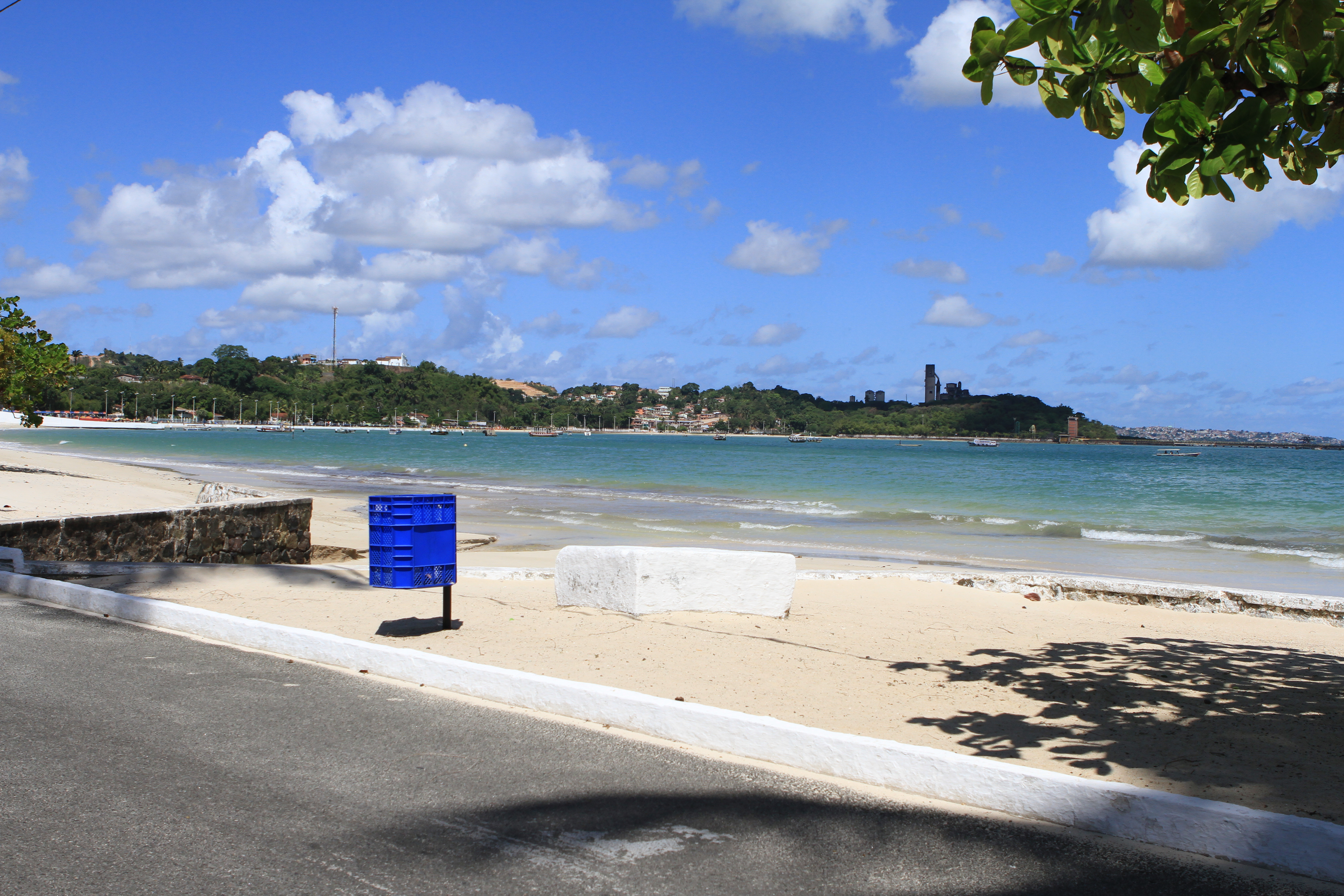 Praia de Inema. Foto: Gabriel Carvalho - Setur